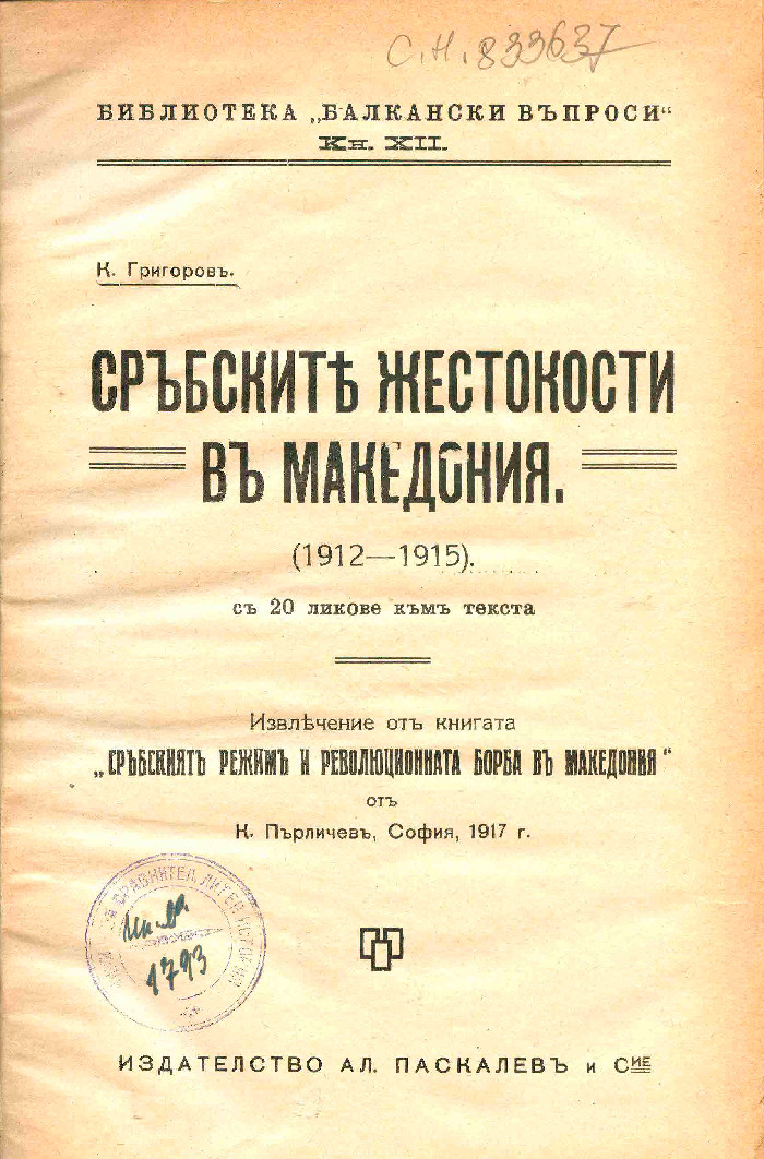 Корица на "Сръбският режим и революционната борба в Македония (1912 - 1915 година)"